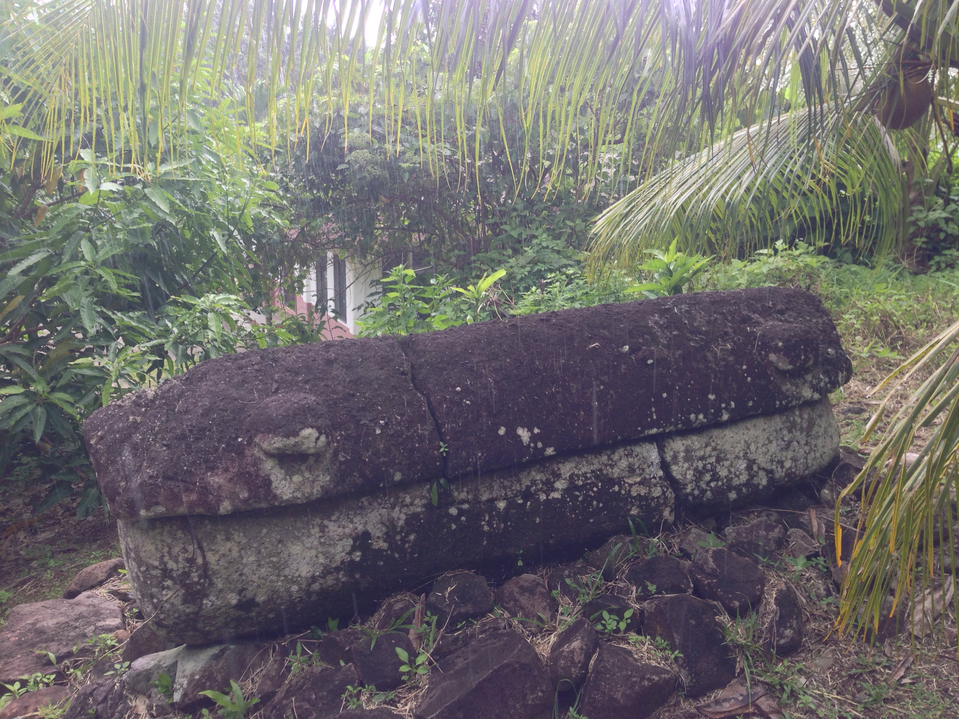 Tet el Badi kivikirst Palaul.